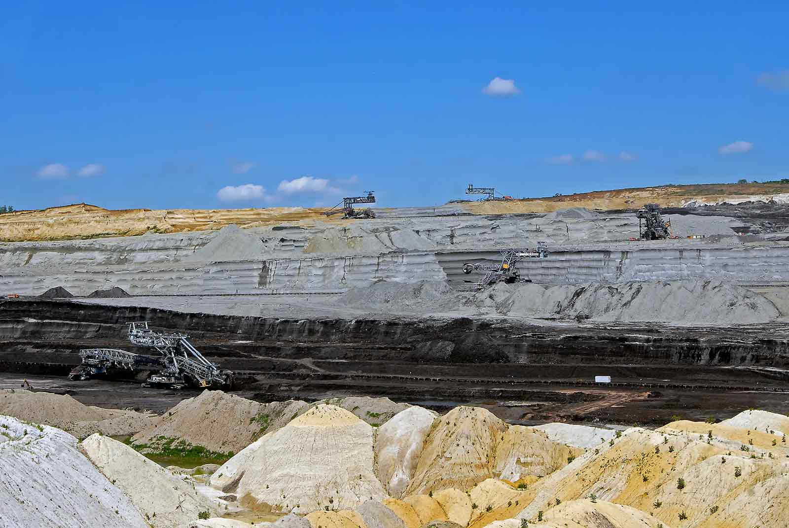 Srpski (latinica): Фотографију снимила и припремила Ивана Милијановић,студент Рударско-геолошког факултета Универзитета у Београду за потребе чланка на википедији